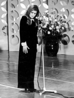 Dalida en 1967 au festival de Sanremo en Italie.